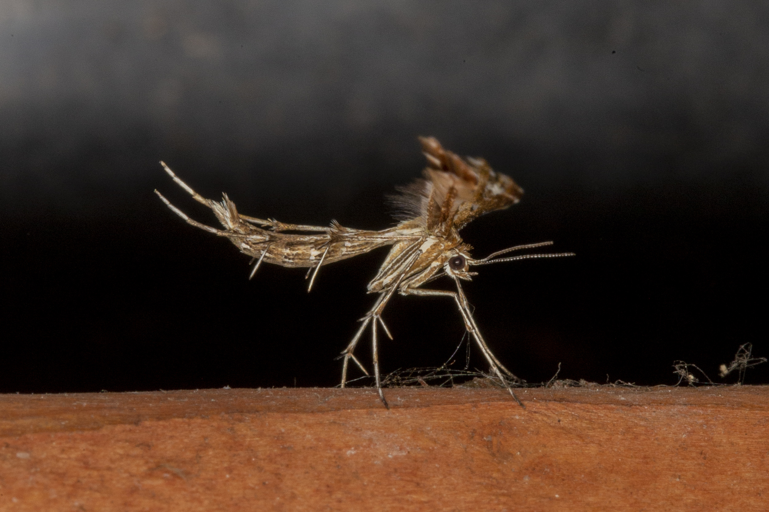 Geina didactyla , Łódź (Polska)